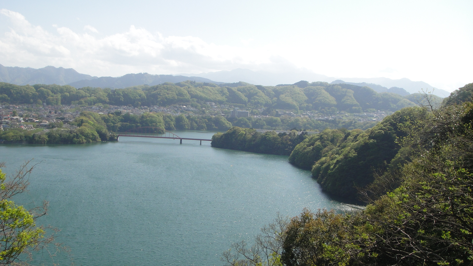 津久井湖三井大橋